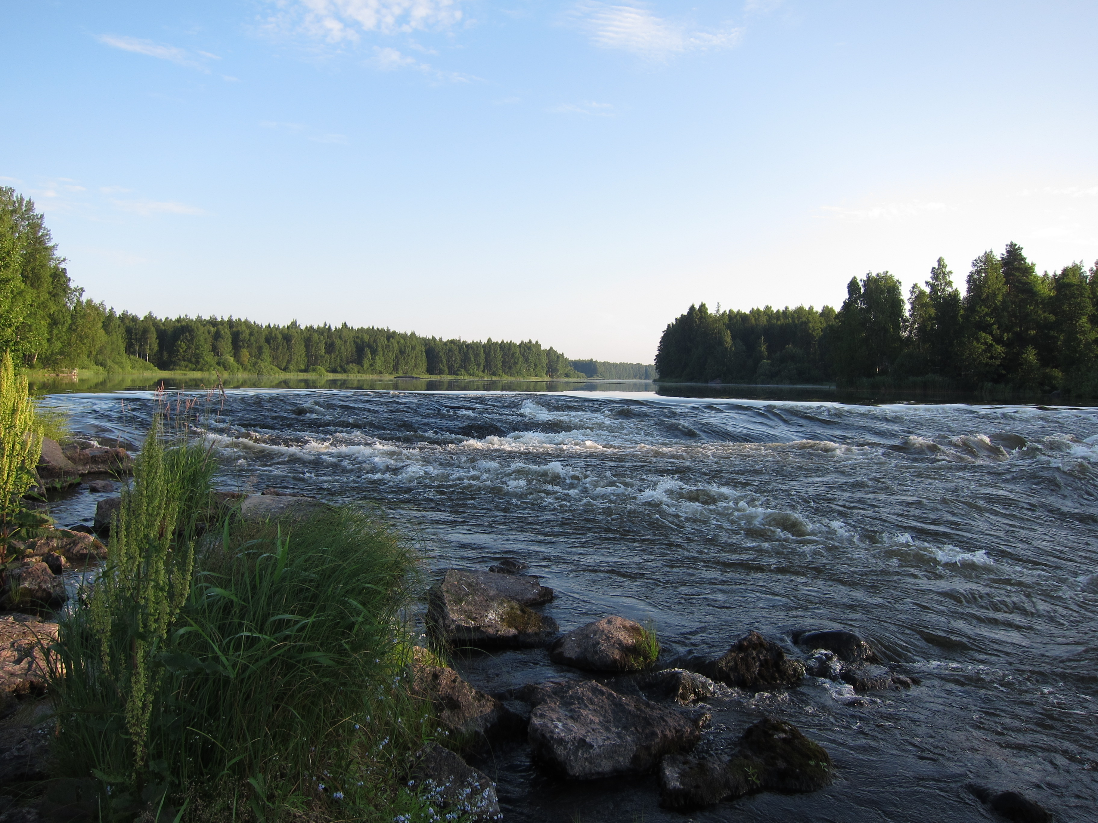 Kymijoen Pernoonkoskien ylintä koskiporrasta eli Myllykoskea Kotkassa.